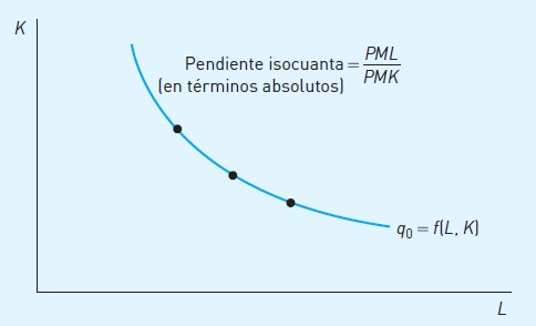 La pendiente de la curva isocuanta es la relación entre los productos marginales del trabajo y el capital